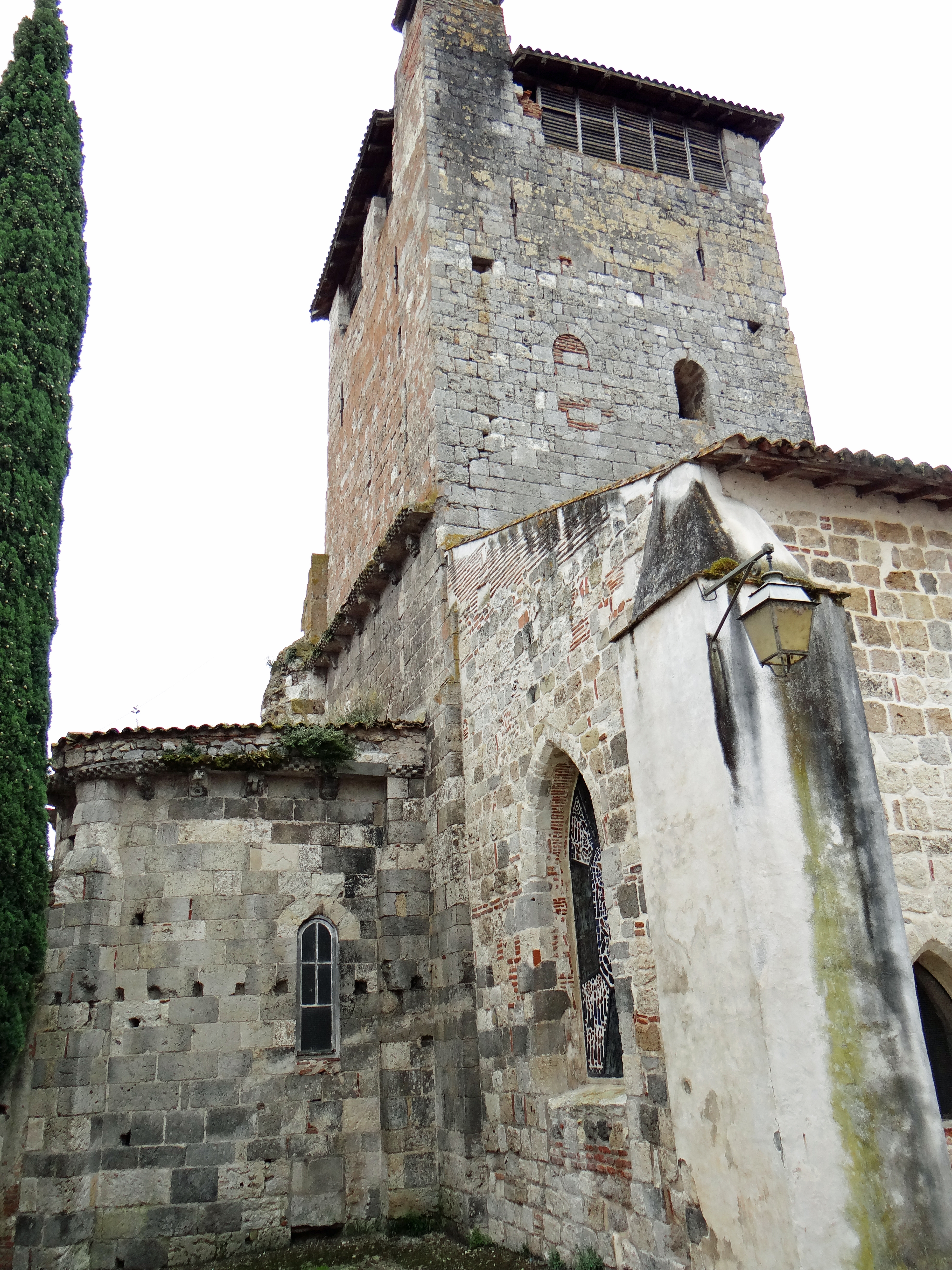 Clairac - Église Saint-Pierre-ès-Liens - Le clocher au-dessus du croisillon nord roman, une absidiole romane